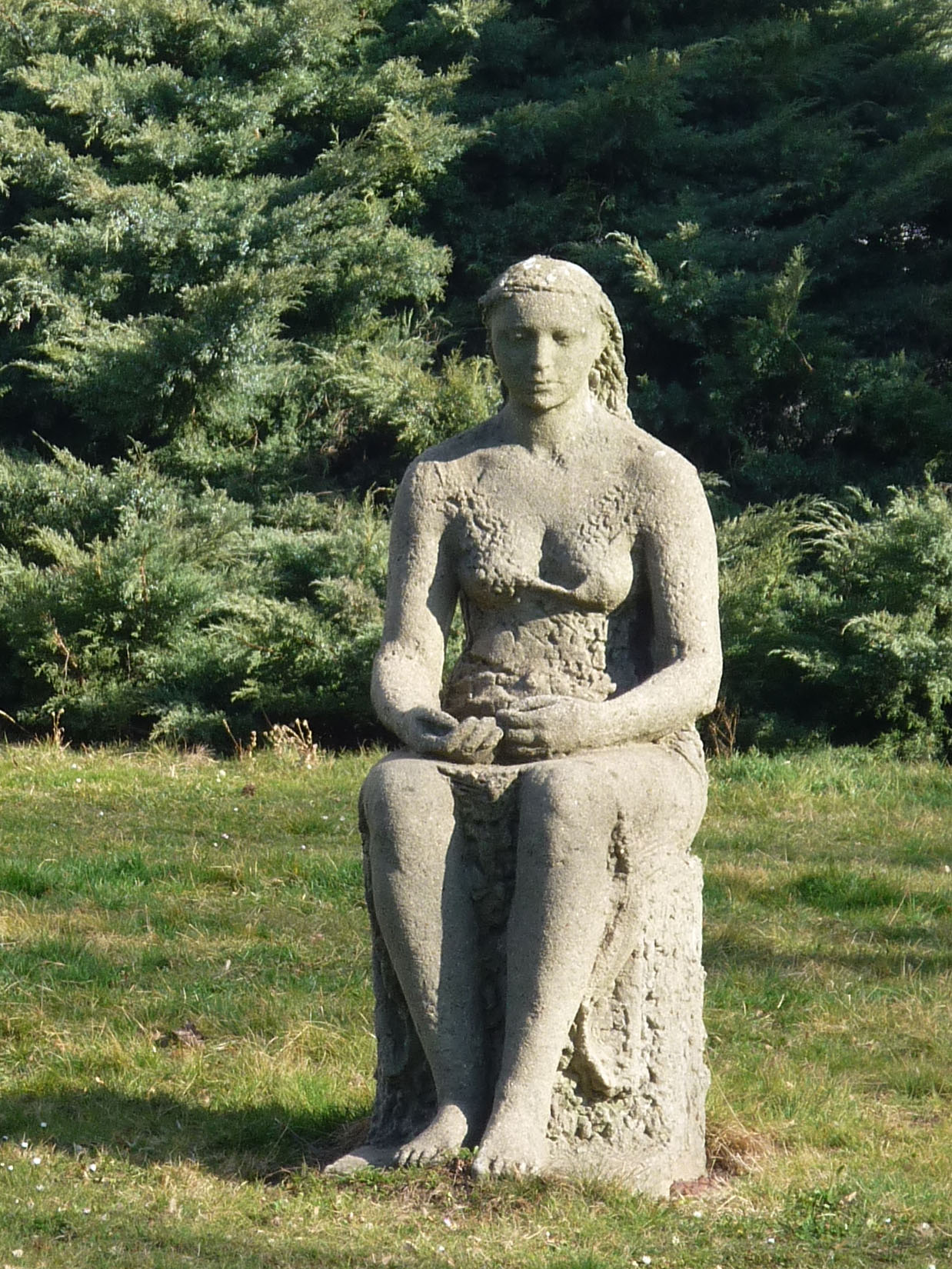 Skulptur Sitzende von Regina Fleck (Beton, 1965) an der Stübelallee in Dresden-Johannstadt